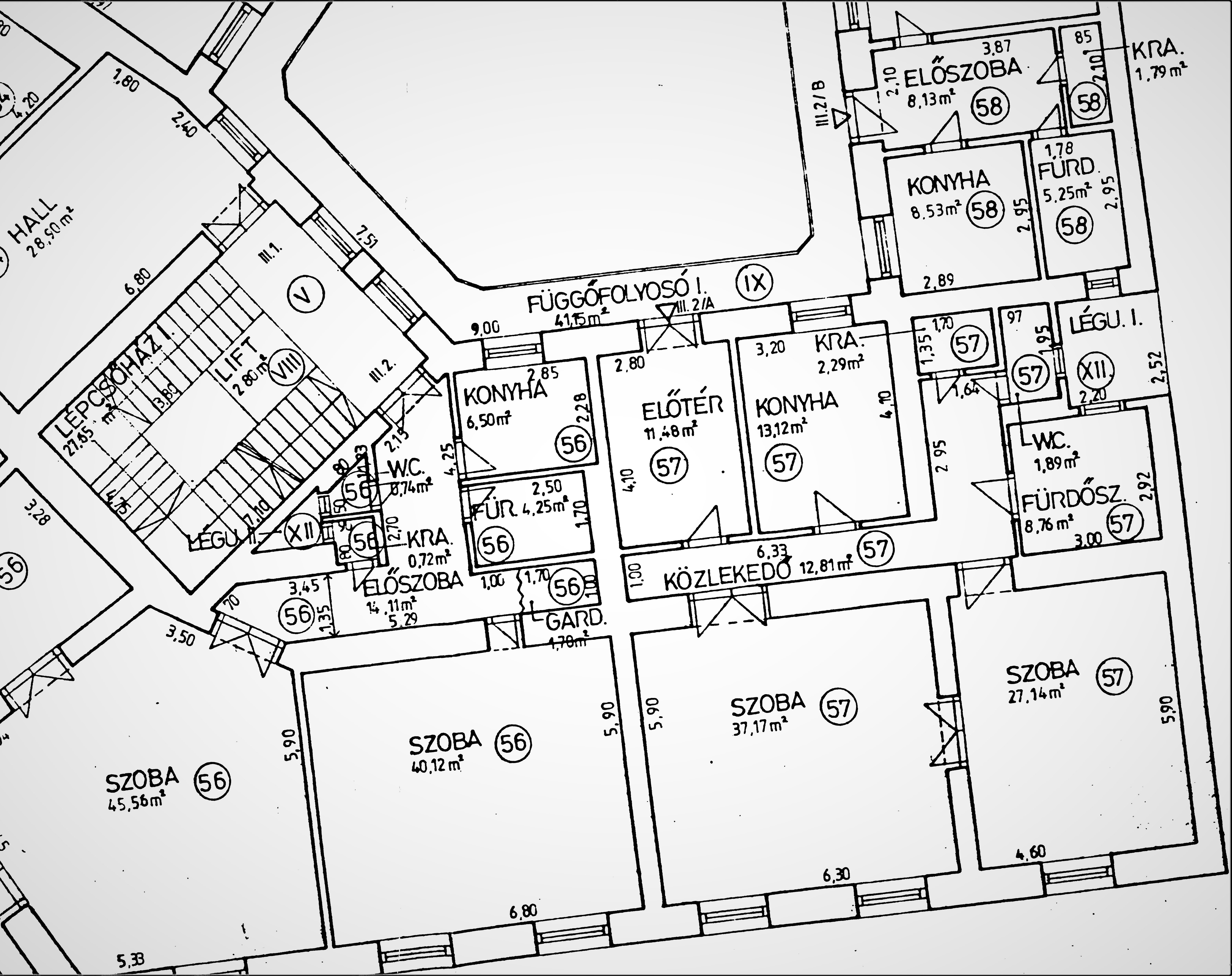 A Hübner-udvar, Kodály körönd 4 sz. (Andrássy út 92 - 94 szám) 1883-1884 alaprajza (részlet). Bukovics Gyula építész tervrajzának részlete. A nagypolgári lakás eredeti területét az államosítást követően két lakásra (56 -57 jelzésű osztották fel.)